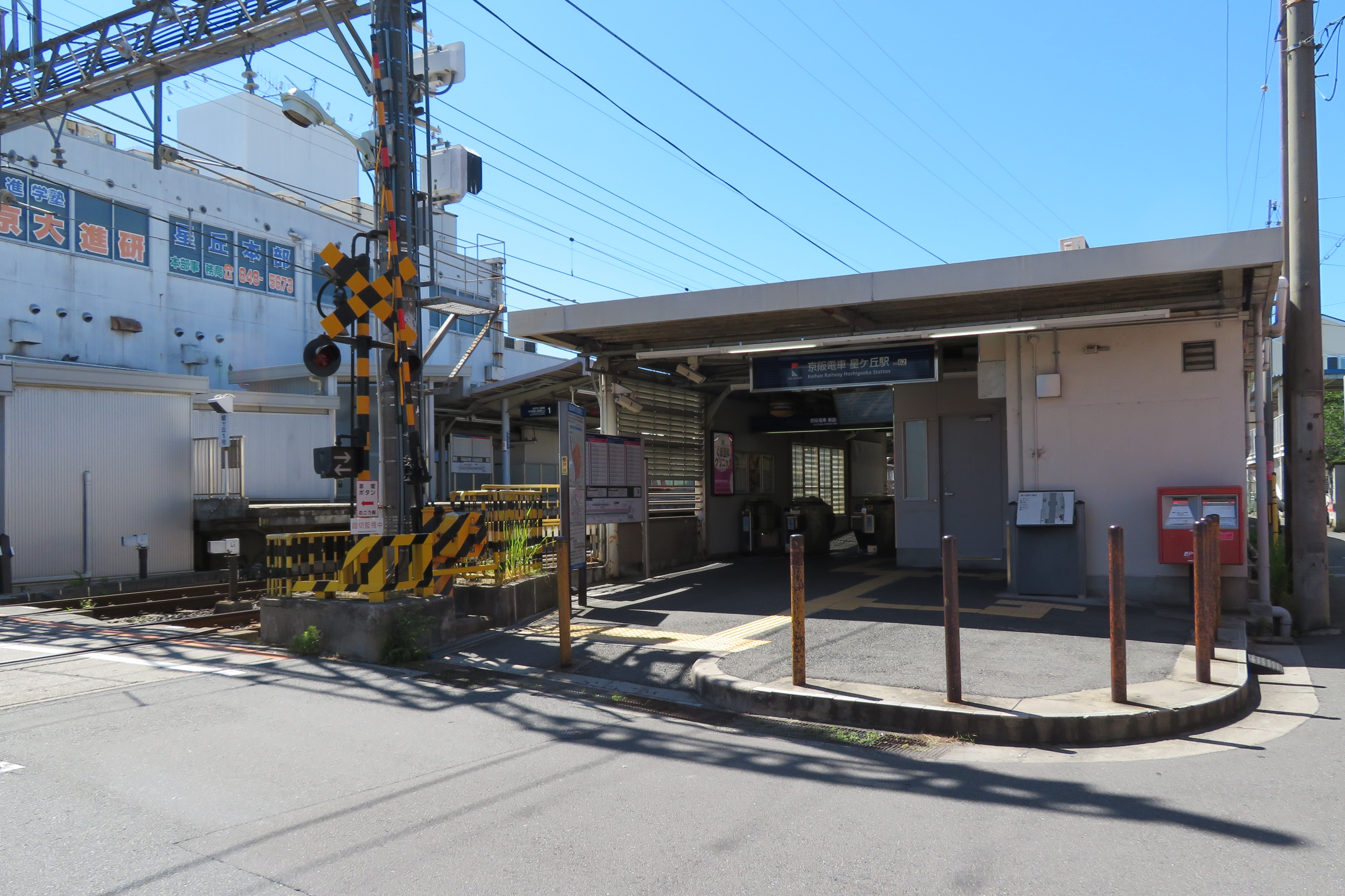 京阪電鉄星ヶ丘駅